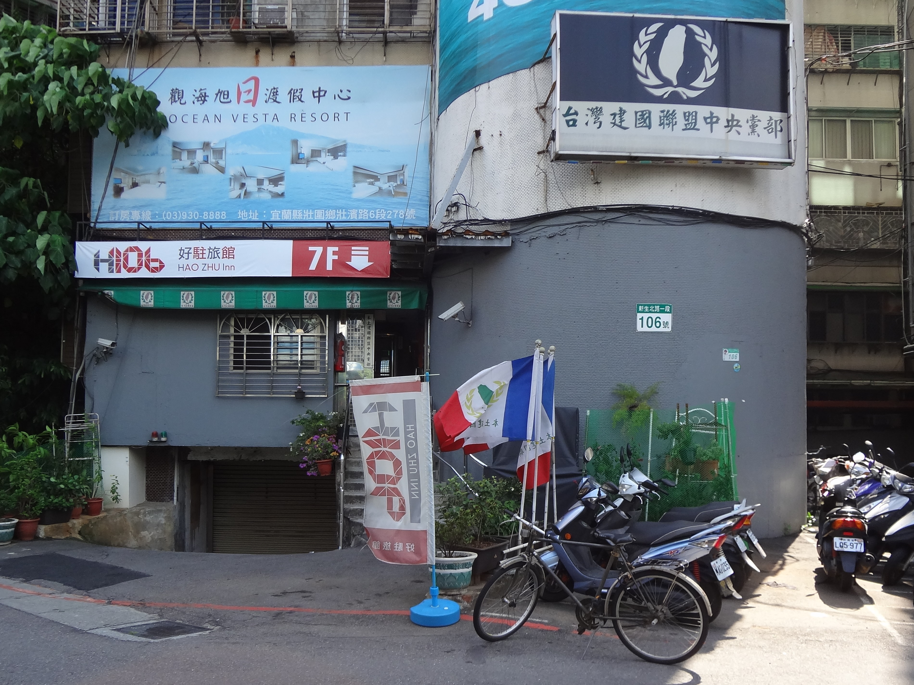 台灣建國聯盟中央黨部，位於臺北市中山區新生北路一段106號1樓。